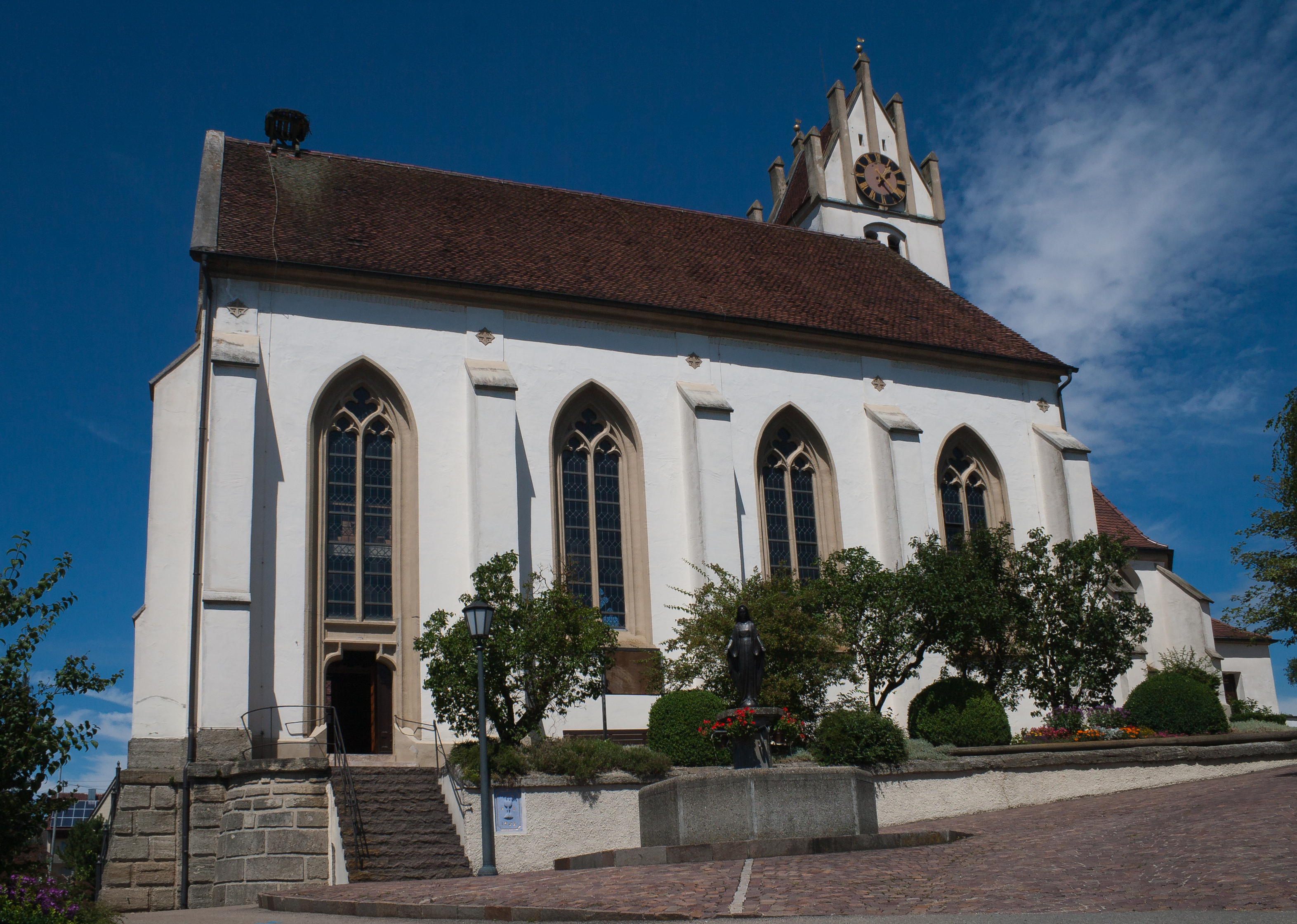 Pfarrkirche St. Nikolaus, Baltringen, Kreis Biberach, Baden-Württemberg, Germany